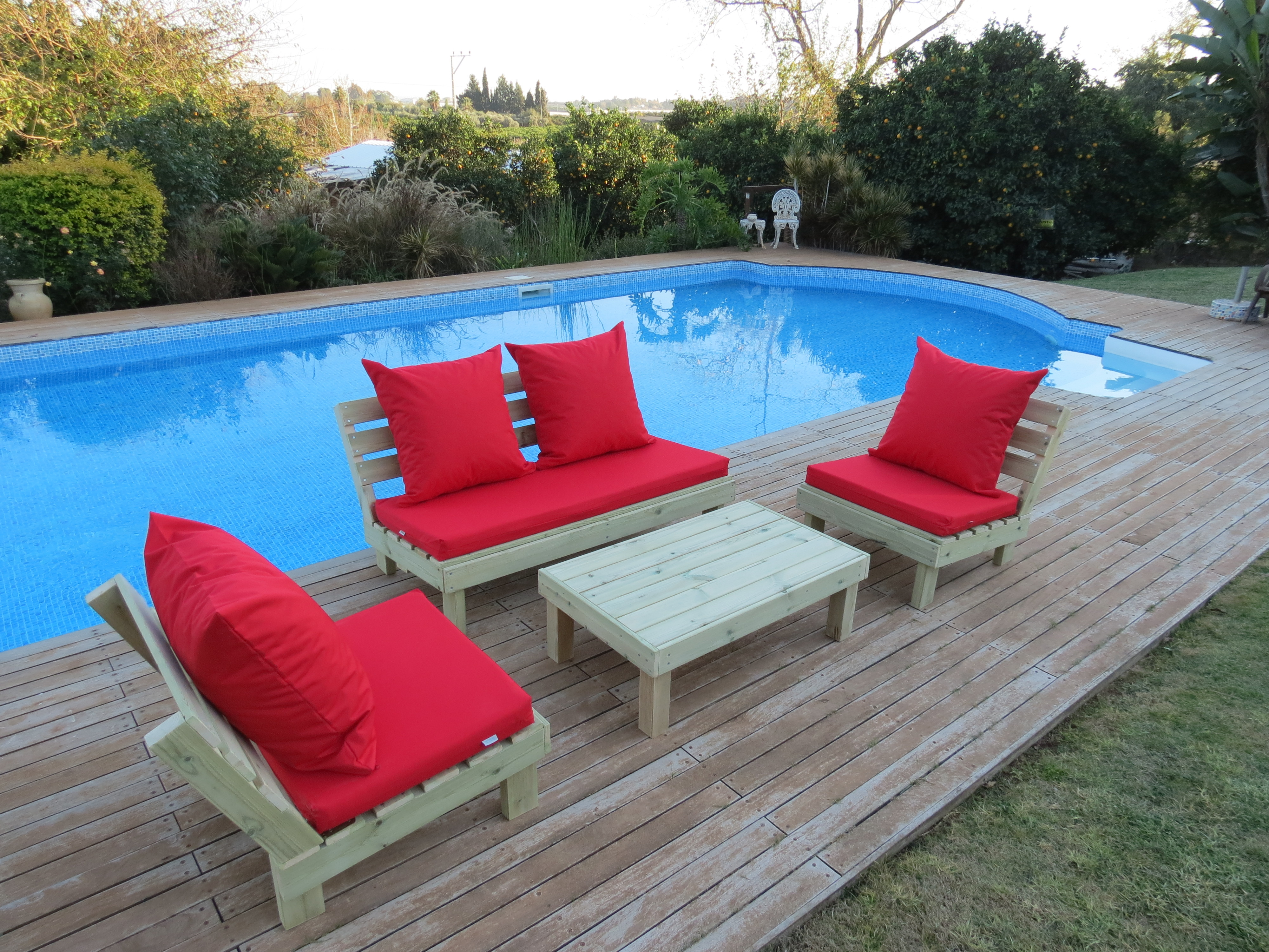 פינת זולה